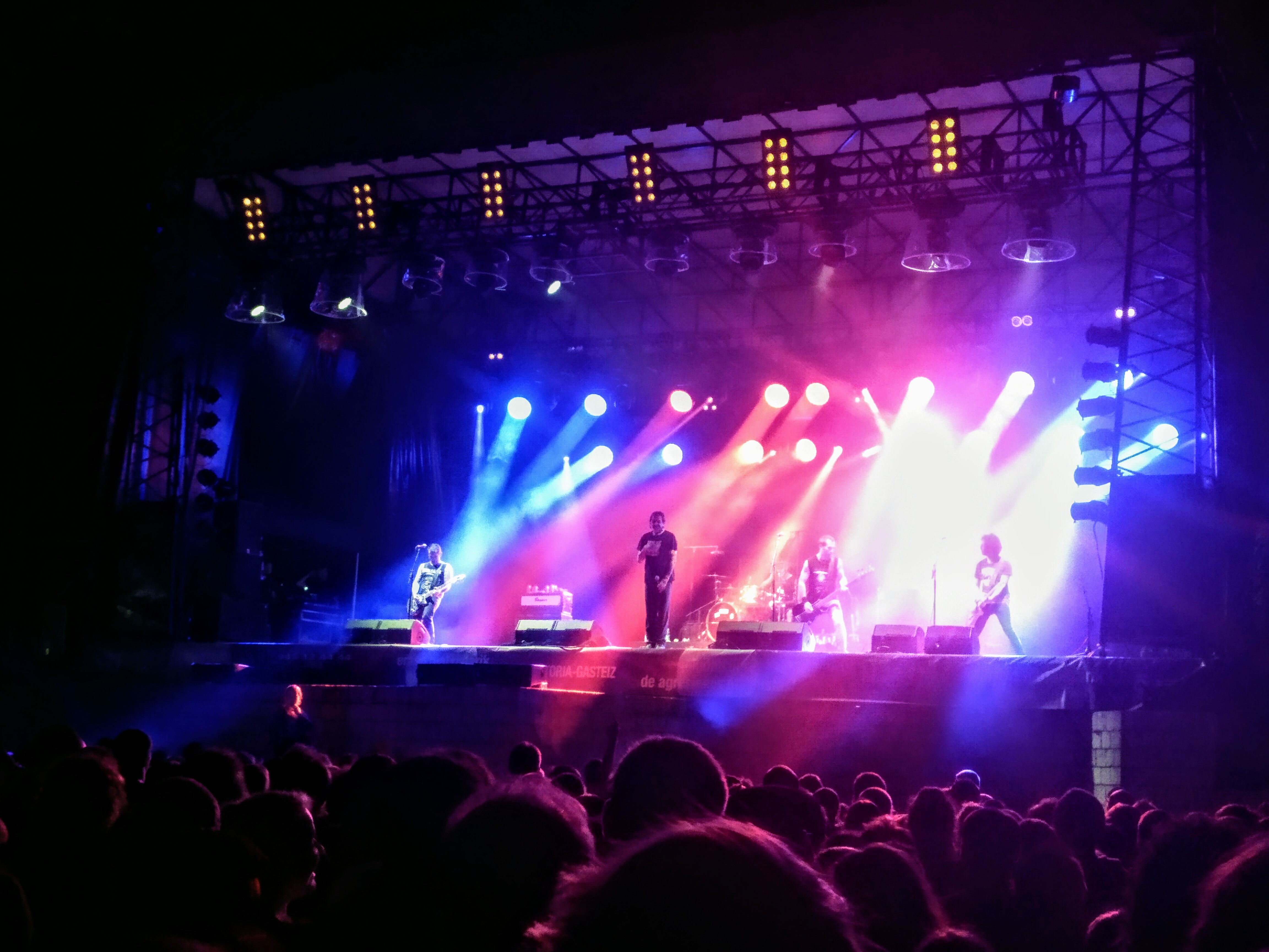 Gatillazoren kontzertua 2019ko Gasteizko jaietan